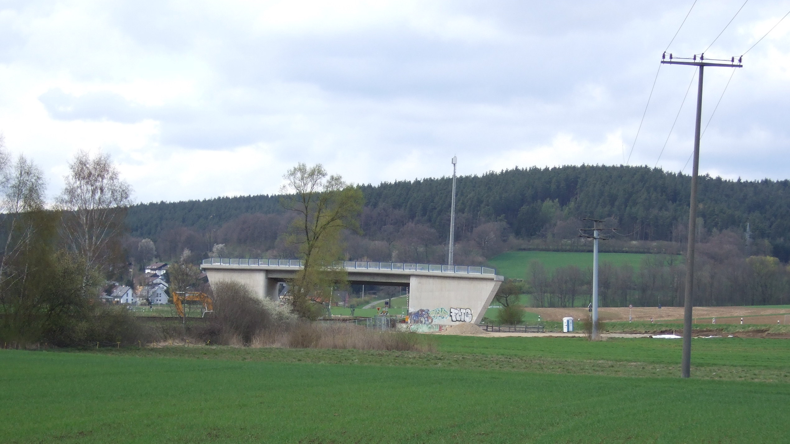 Soda-Brücke Ramsenthal bei Bayreuth